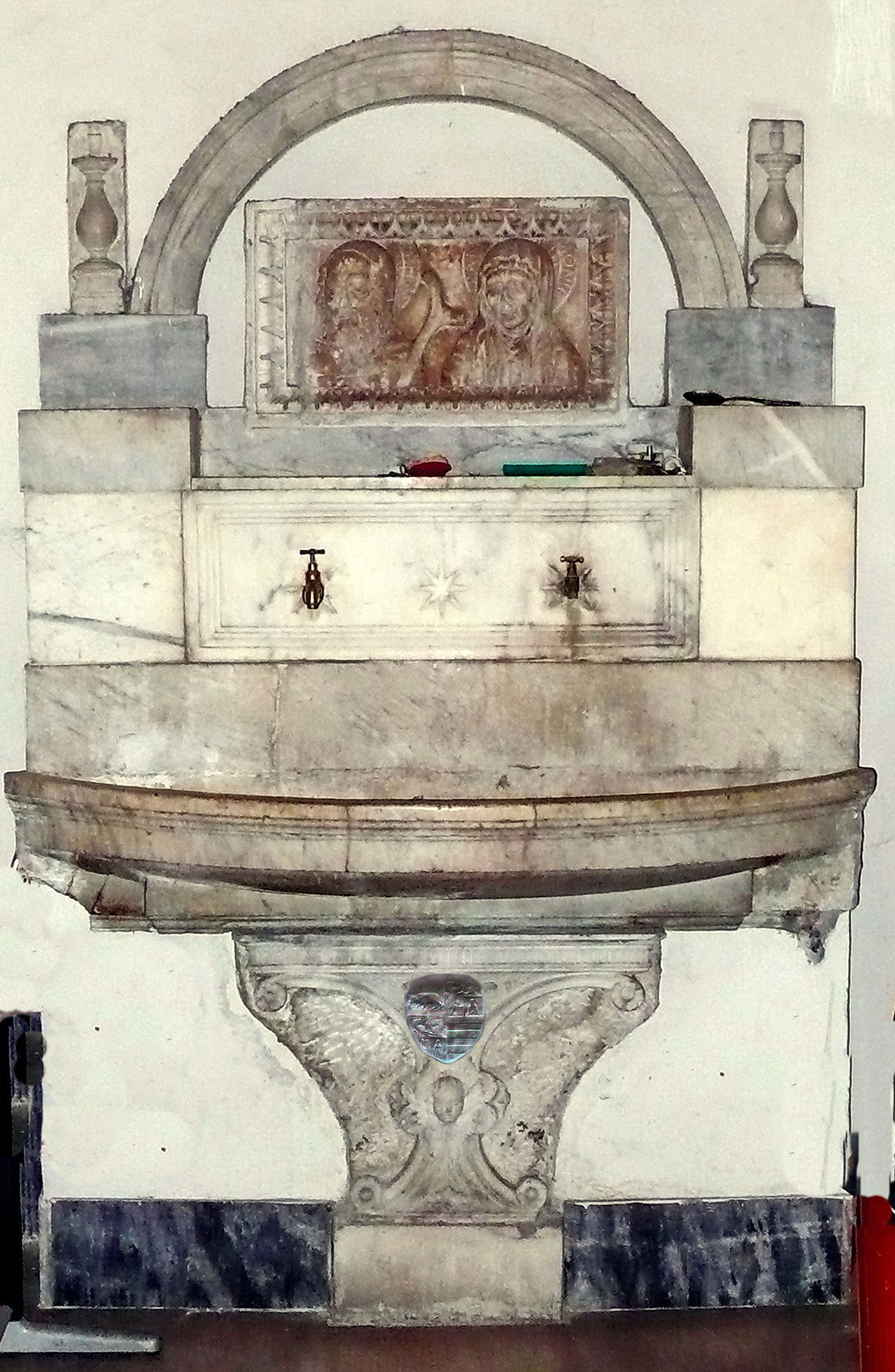 Rom - Basilika Santa Maria del Popolo